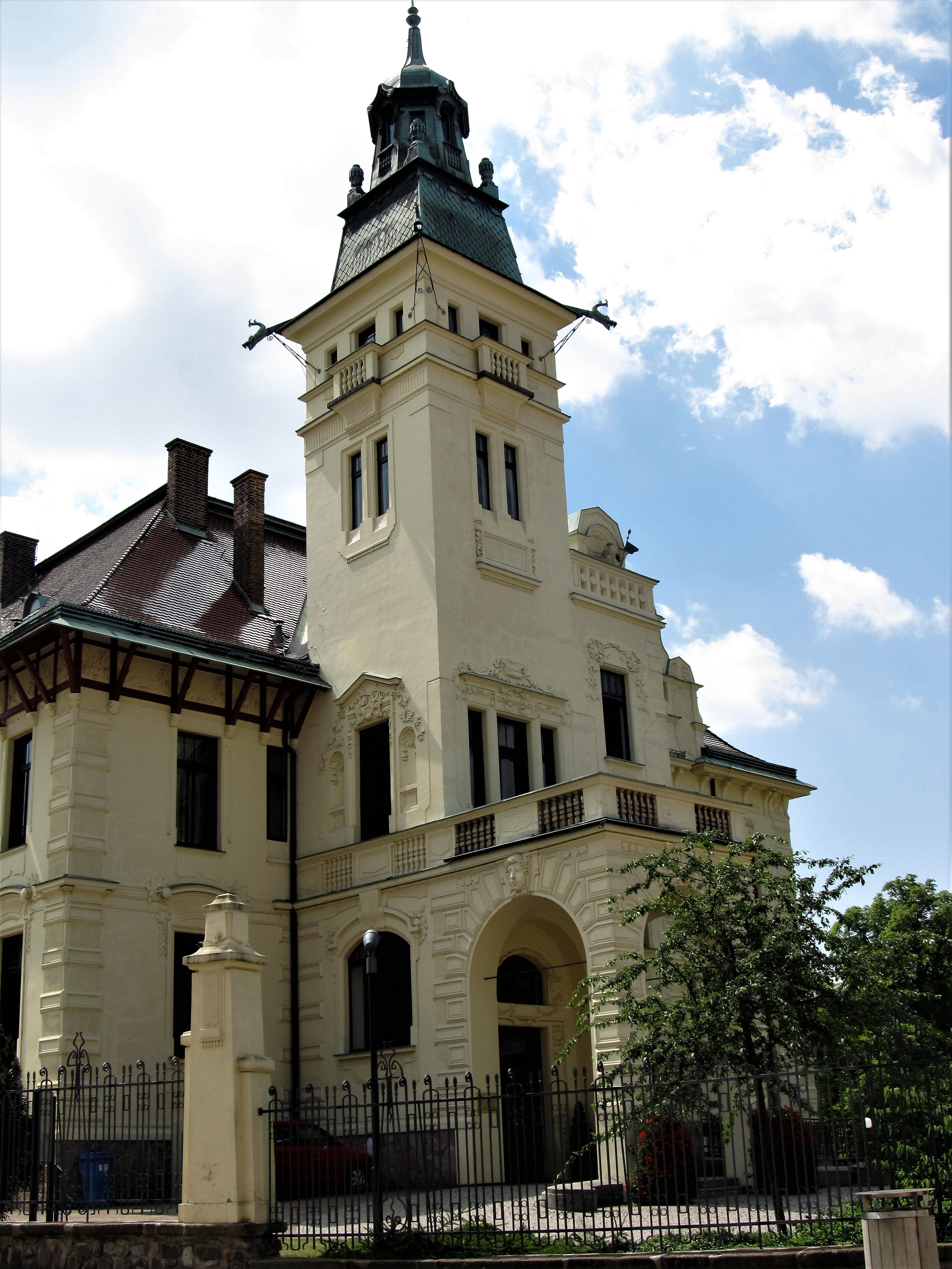 Hernychova vila v Ústí nad Orlicí, vstupní průčelí s věží